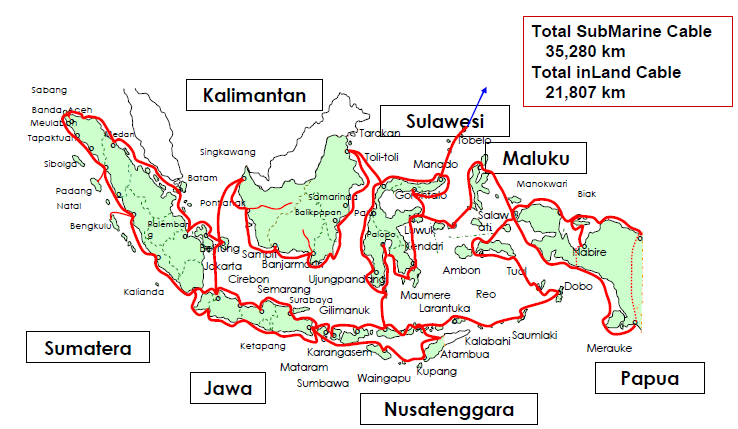 Palapa Ring atau kadang disebut dengan istilah Tol Langit adalah suatu proyek pembangunan jaringan serat optik nasional yang akan menjangkau sebanyak 34 provinsi, 440 kota/kabupaten di seluruh Indonesia dengan total panjang kabel laut mencapai 35.280 kilometer, dan kabel di daratan adalah sejauh 21.807 kilometer.